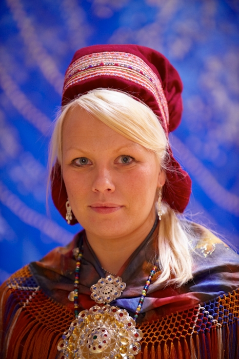 Leder for partiet Árja. Medlem av plan- og finanskomitéen. Foto: Sametinget